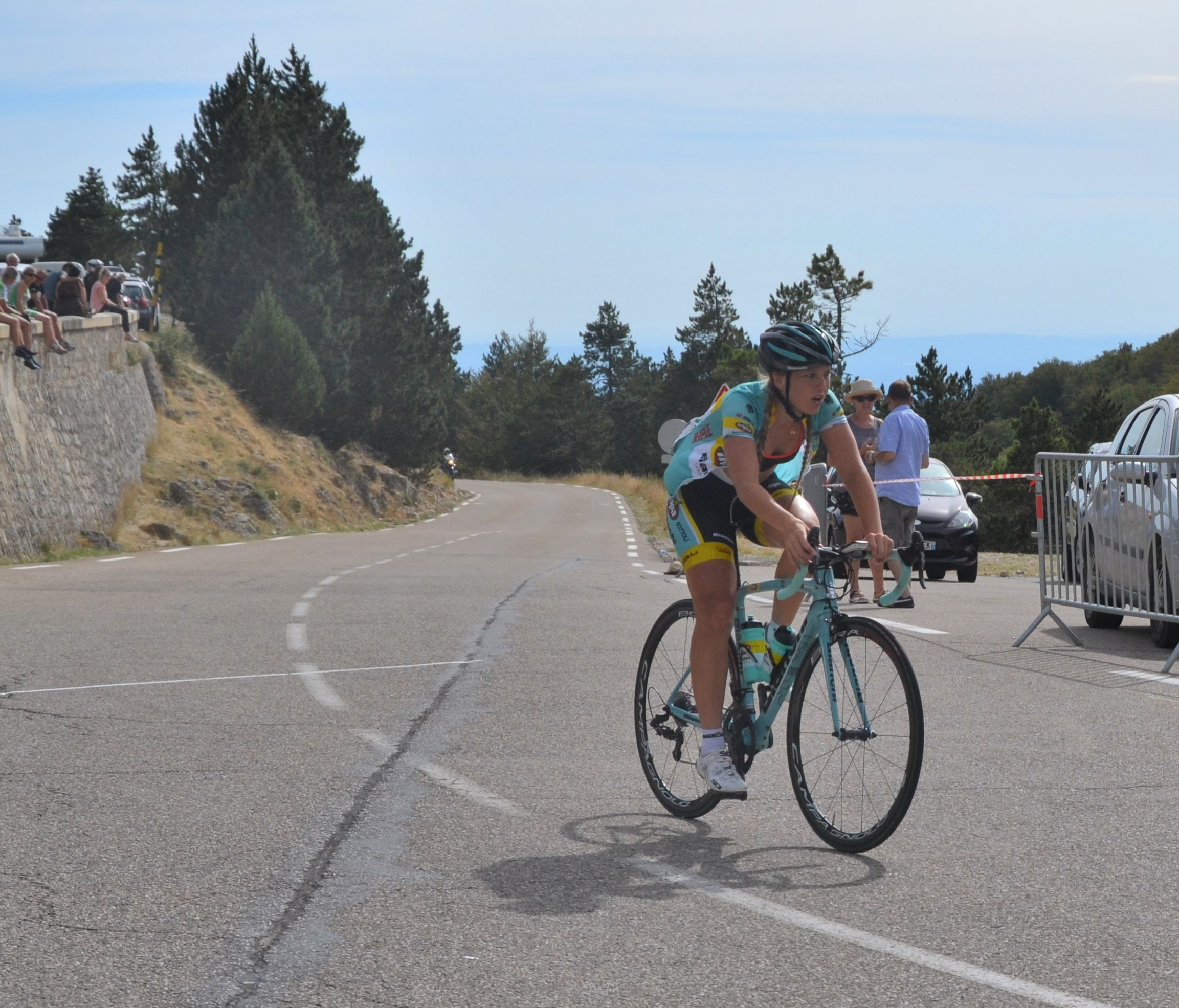 3ème étape du Tour féminin international de l'Ardèche 2016, lors de l’ascension du Mont Ventoux